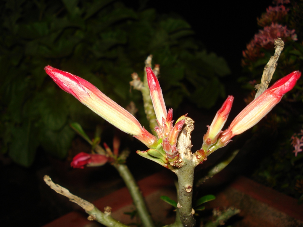 Adenium bud